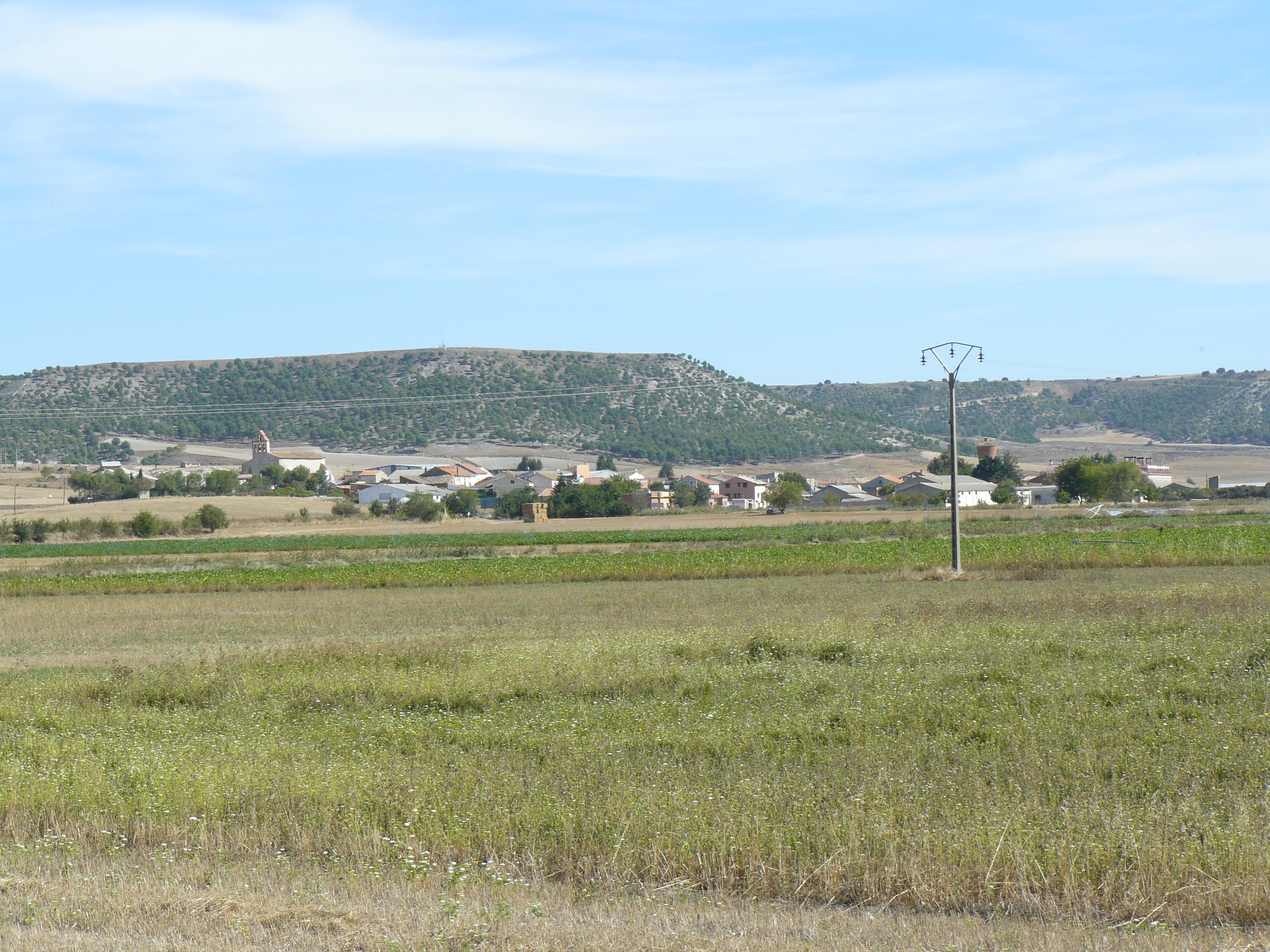 Villarmentero de Esgueva, Valladolid.